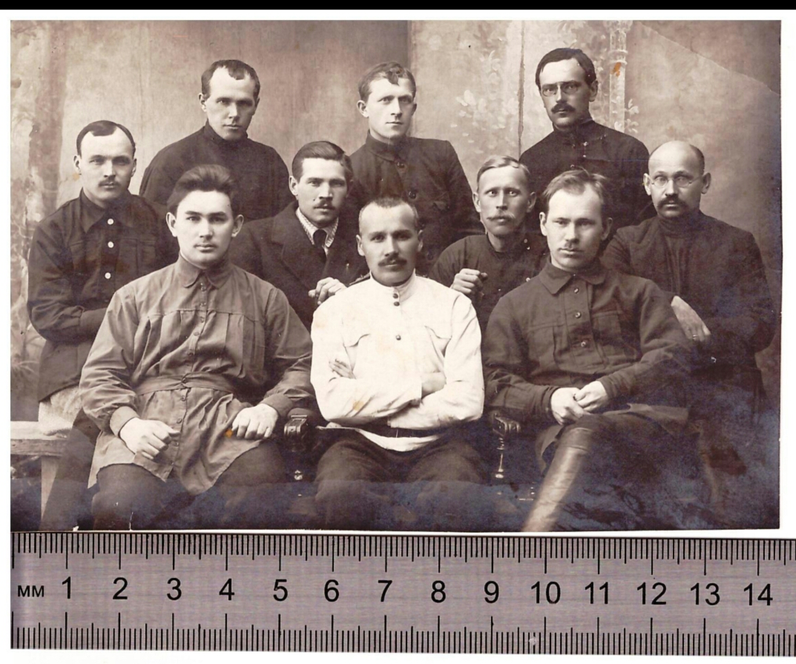 Вначале (в 1918) униформы ВЧК как таковой, не было вообще. Принятые на службу ходили в той одежде, какая у них имелась,. Настоятельно рекомендовалось носить одежду военных образцов. Предметы одежды и снаряжения, принятые в органах и войсках ГПУ, отличались от красноармейских только расцветкой декоративных элементов и отдельными деталями одежды. Впервые форма для "особых органов ГПУ" была введена 27 июня 1922 г. приказом ГПУ №119, который базировался на Приказе Реввоенсовета Республики (РВСР) № 322 от 31 января 1922 г., где описывалось обмундирование для Рабоче-Крестьянской Красной Армии (РККА). На первых порах форма обычного оперативного состава ГПУ была довольно скромной: темно-синяя гимнастерка без окантовки и фуражка защитного цвета, тоже без окантовки (приказ ГПУ № 280 от 3 ноября 1922 г.). .